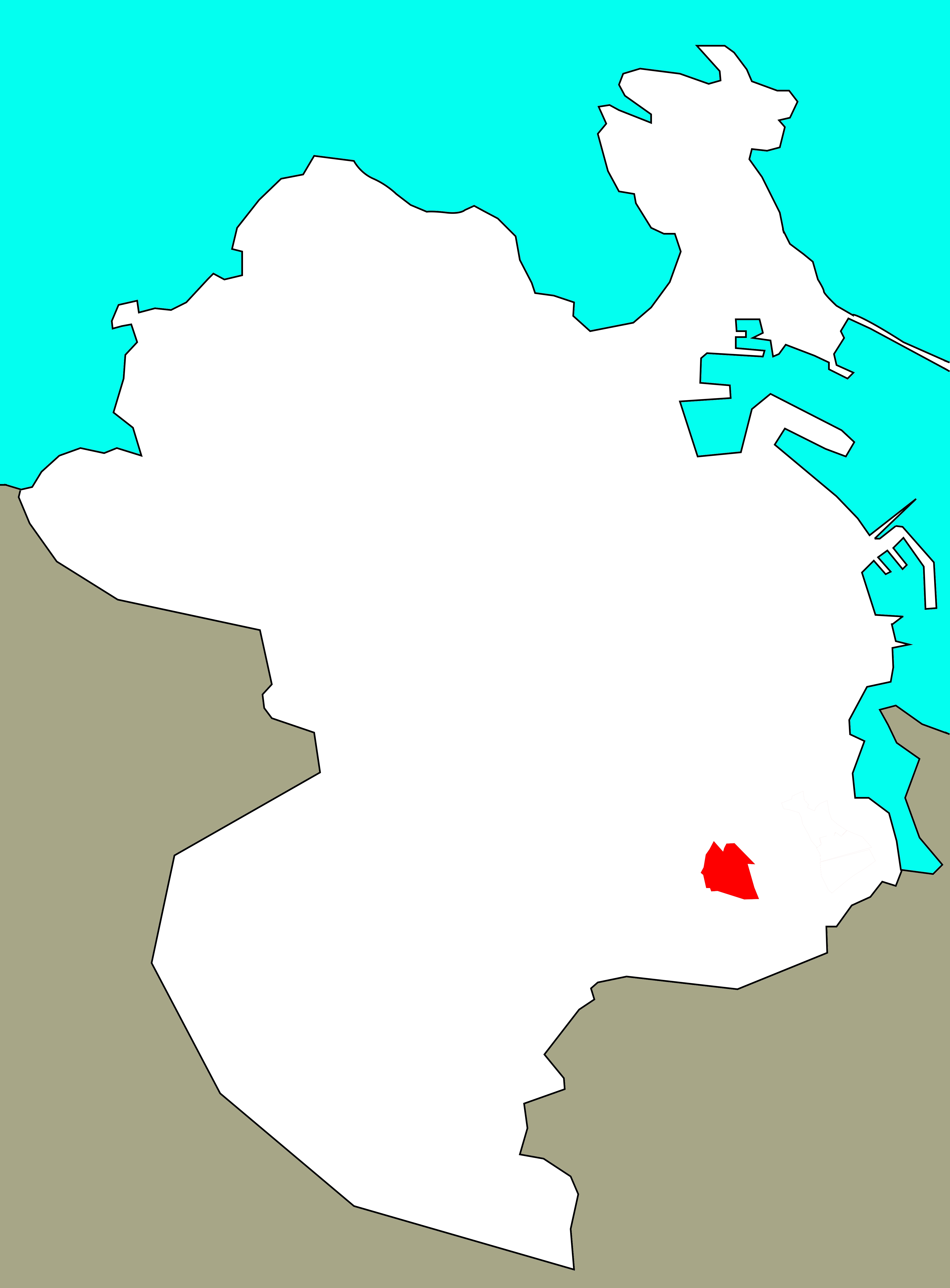 Situación de Penarredonda no concello da Coruña, segundo